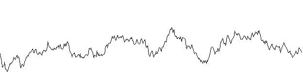 Rücktransformation vom Frequenzverlauf der gefilterten Signale zum zeitlichen Verlauf: Gefiltertes Rauschen